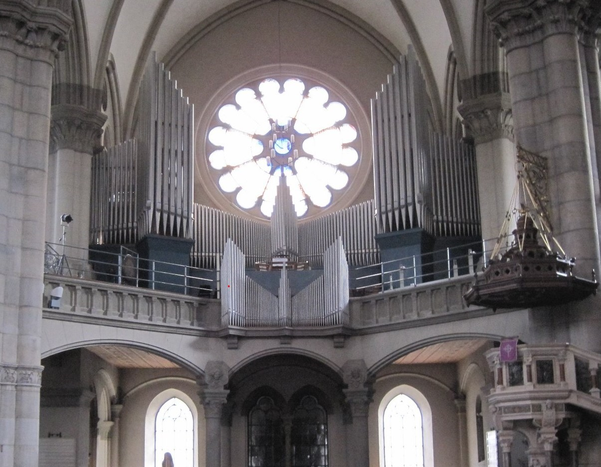 Orgel in St. Lukas in München